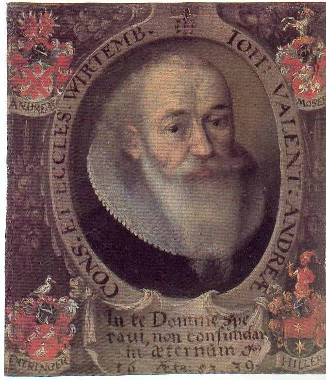 Johann Valentin Andreae (1586-1642)